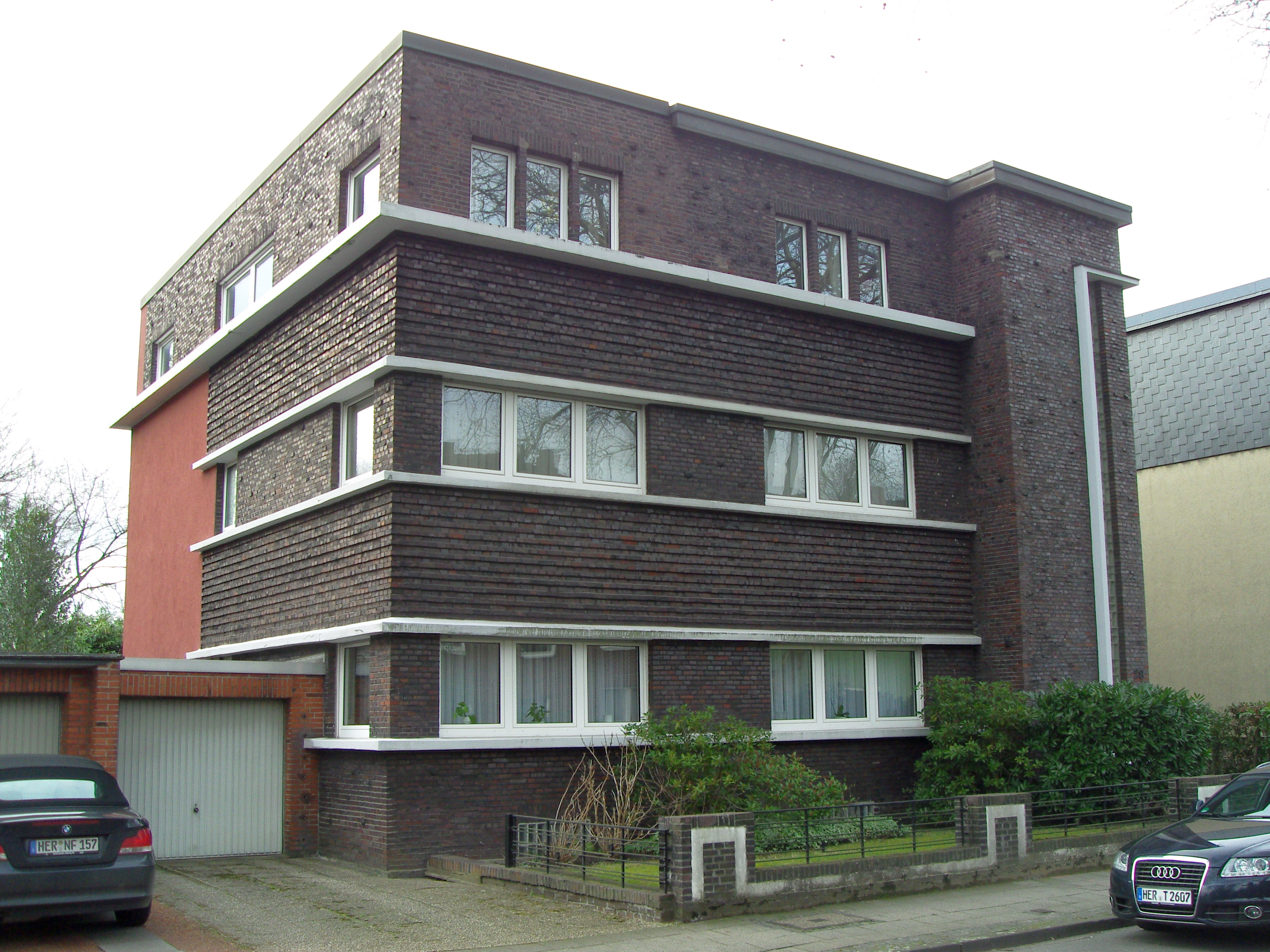 Reichsstraße 28 in Herne-Eickel This is the photograph of an architectural monument. It is part of the list of cultural monuments of Herne, no. 647